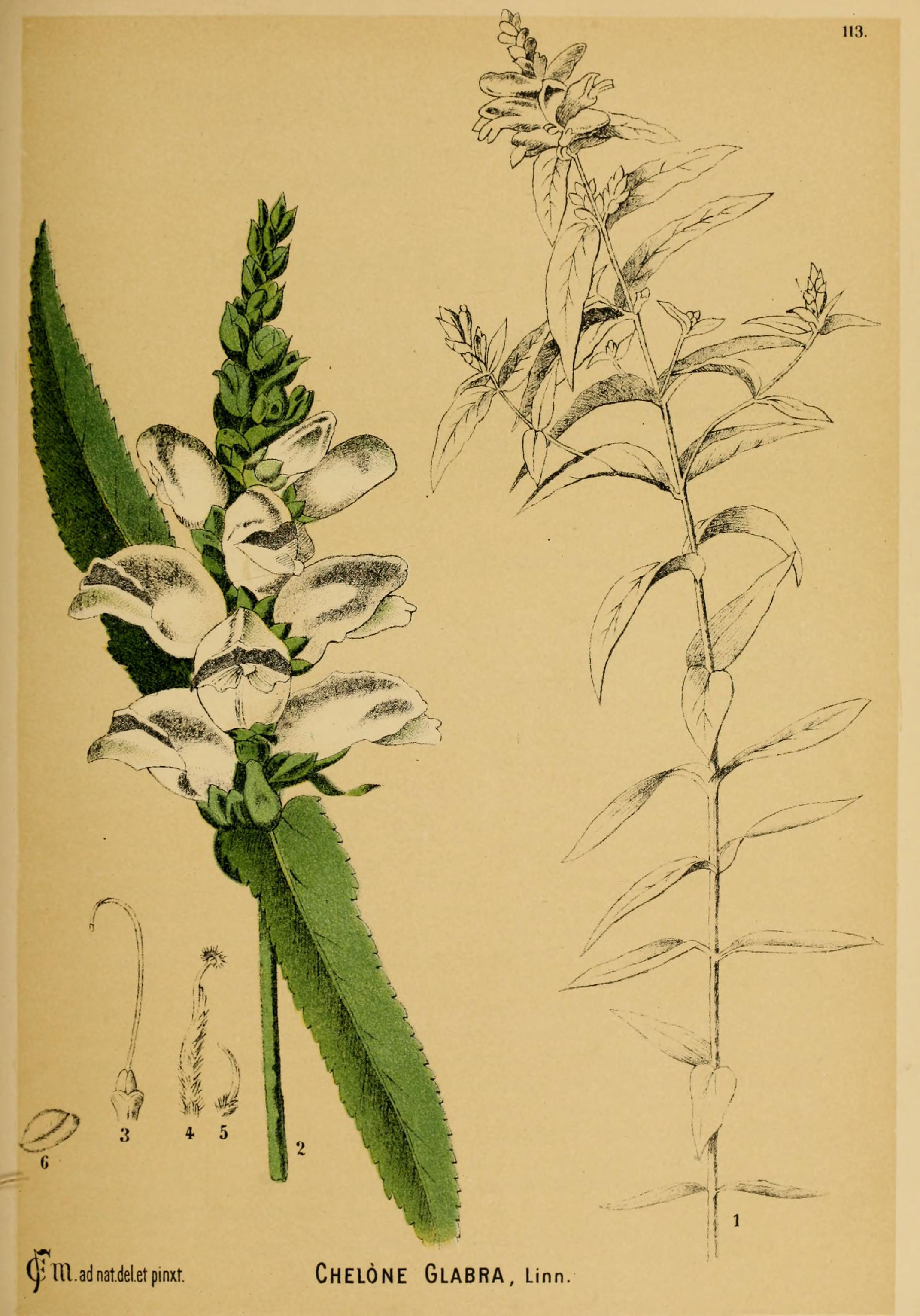 Y-nLadnatdeletpinxr. Chelone Glabra, Linn.